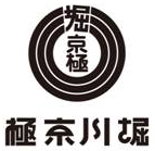 堀川京極ロゴ